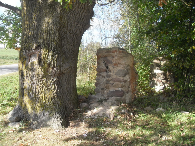 Міхайлоўшчына. Рэшткі брамы